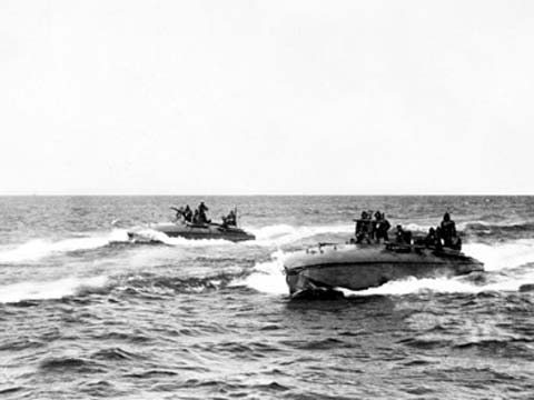 Coppia di MAS in esercitazione nelle ultime fasi della Prima guerra mondiale